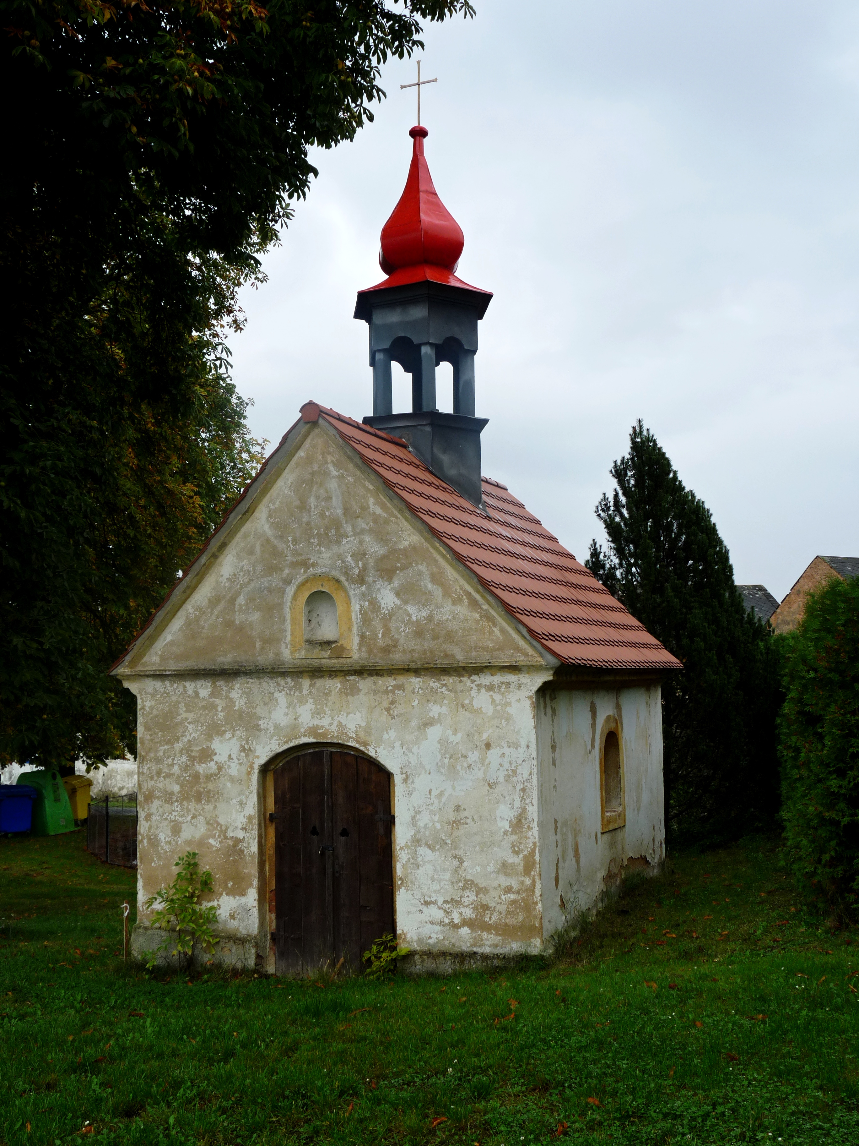 Kaple, náves, Polínka.